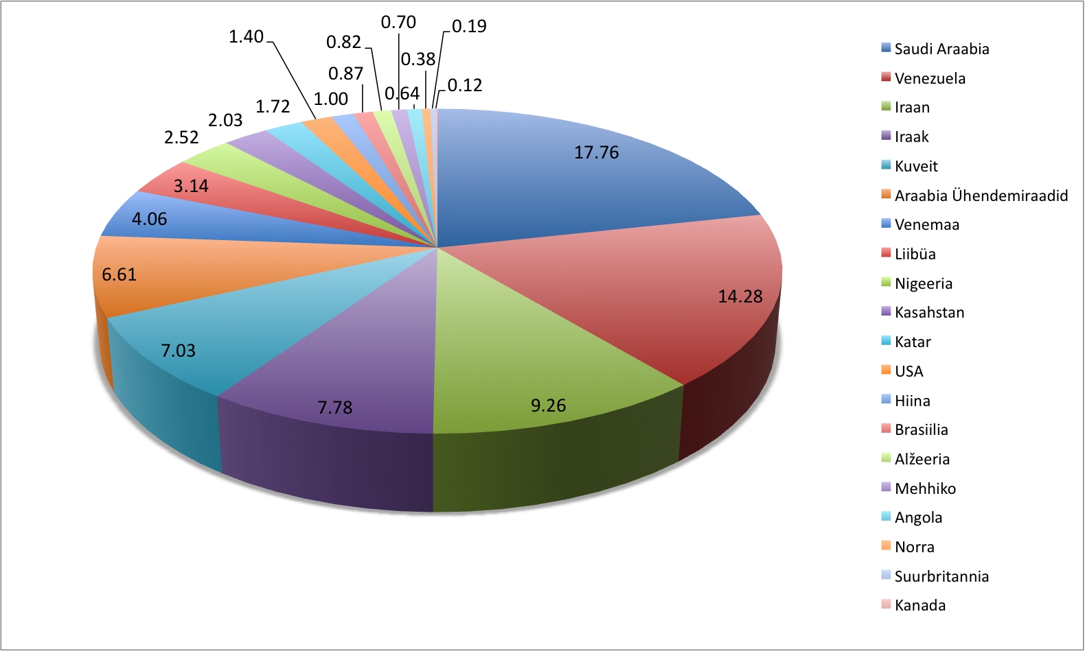 Kahekümne suurima naftatootja nafta reservvarud protsentides kogu maailma reservvarust seisuga 1. jaanuar 2011.